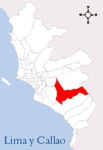 Lodalización del Distrito de Pachacamac